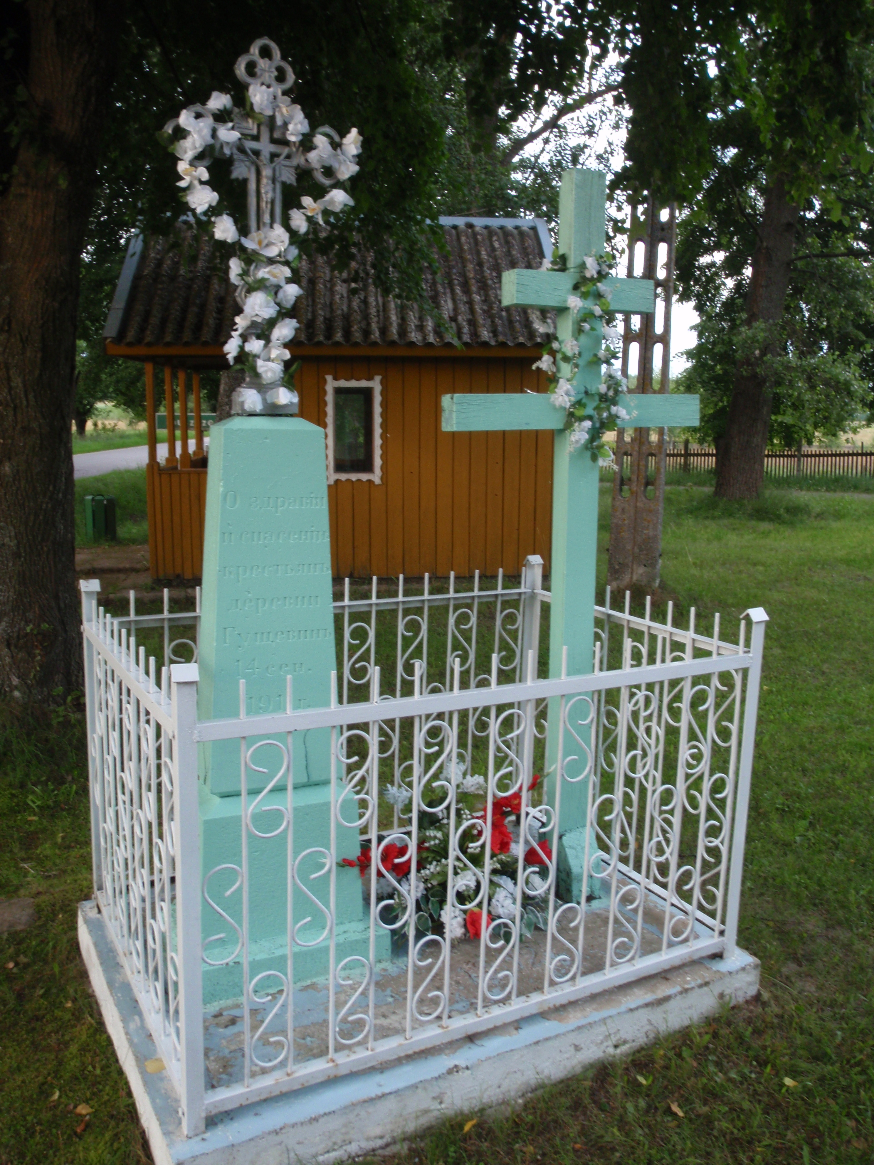 Przydrożna kapliczka z 1911 roku we wsi Guszczewina koło przystanku autobusowego, na końcu wjazdu od strony Olchówki О здравіи и спасеніи крестьянъ деревни Гущевинъ 14 сен. 1911 г.